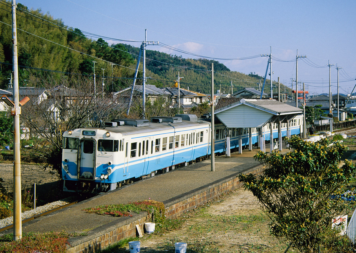 牟岐線阿波橘駅